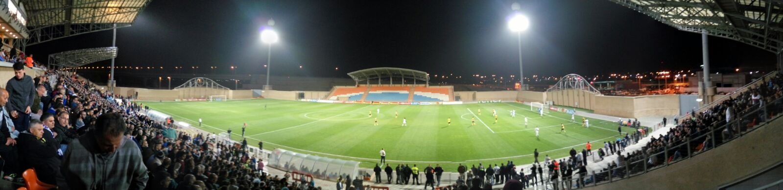 טוטו עכו - תמונת פנורמה מיציע המארחים